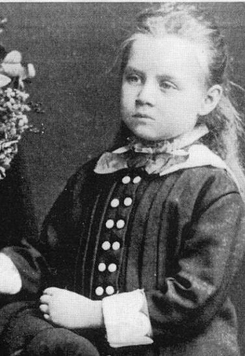 Princesa Alexandra da Grécia na sua infância